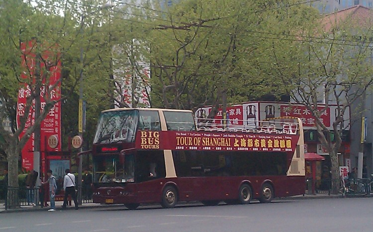 大巴士公司上海都市黄金旅游圈（红线）观光车